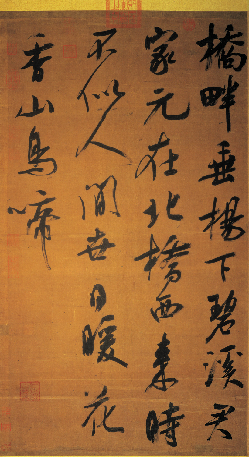 為蔡襄〈訪陳處士〉，詩云：「橋畔垂楊下碧溪。君家元在北橋西。來時不似人間世。日暖花香山鳥啼」